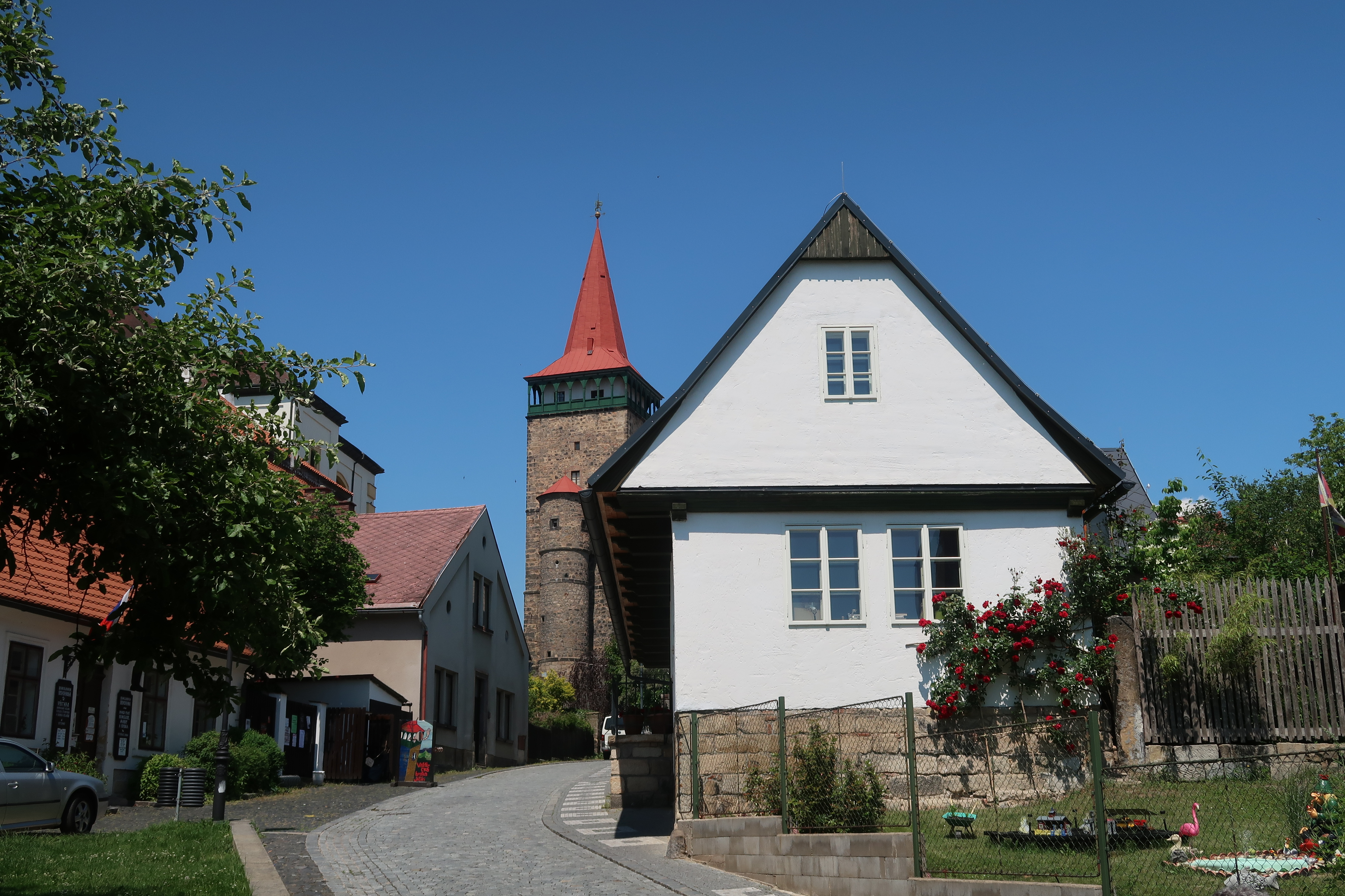 Ulice Pod Koštofránkem s Valdickou branou